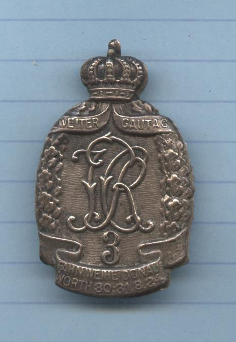 Regimentsabzeichen 3. Bay. Infanterie Regiment